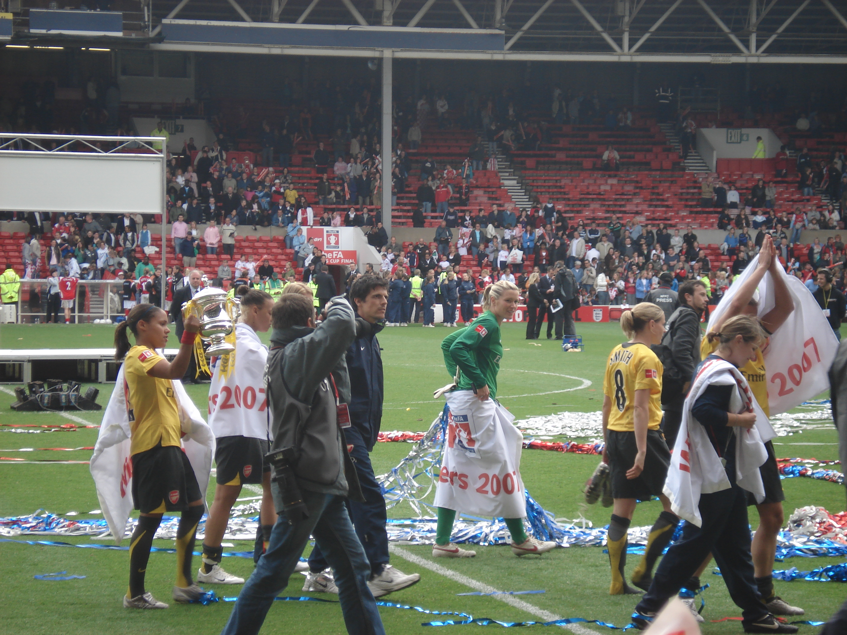 Arsenal Ladies